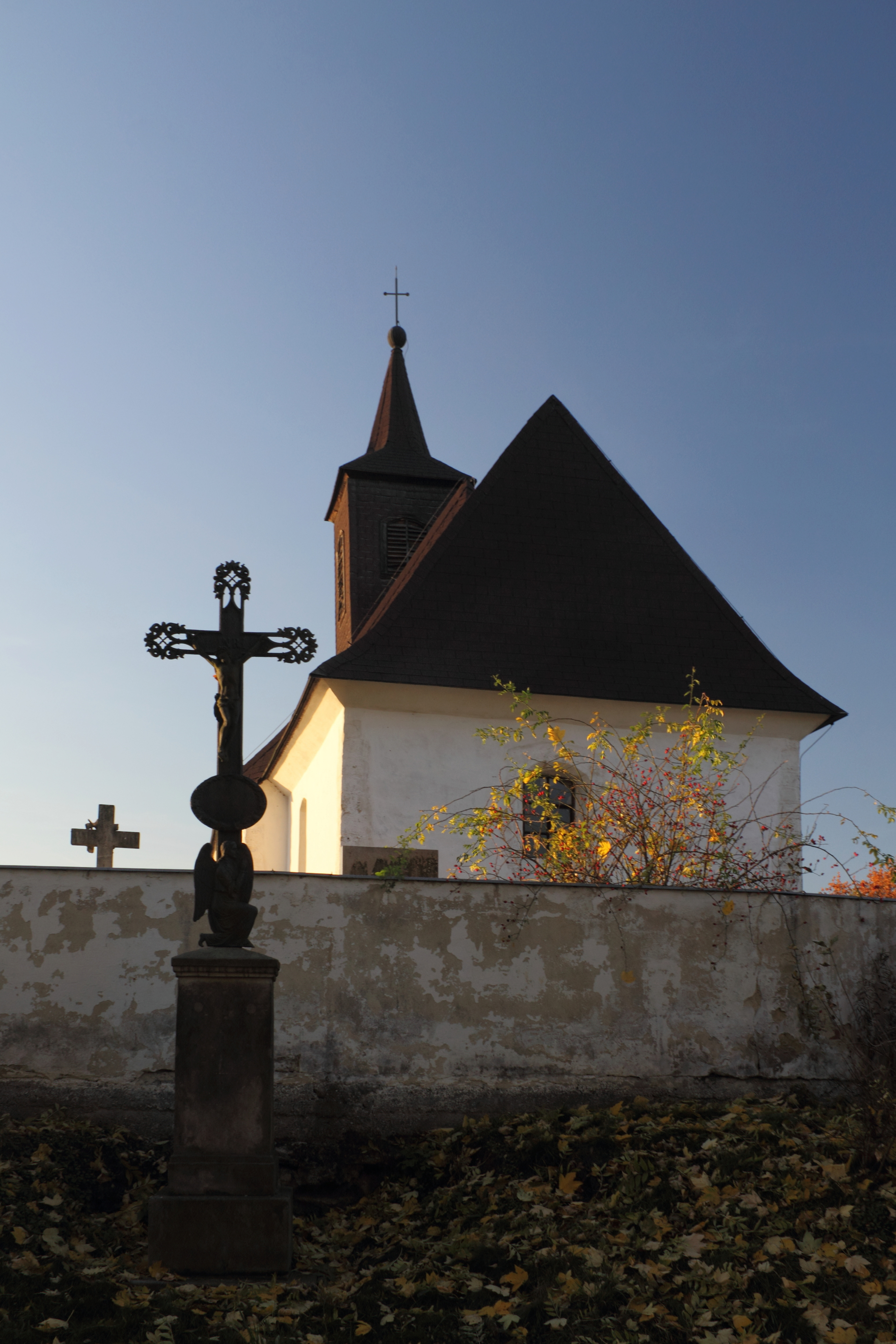 Chocnějovice